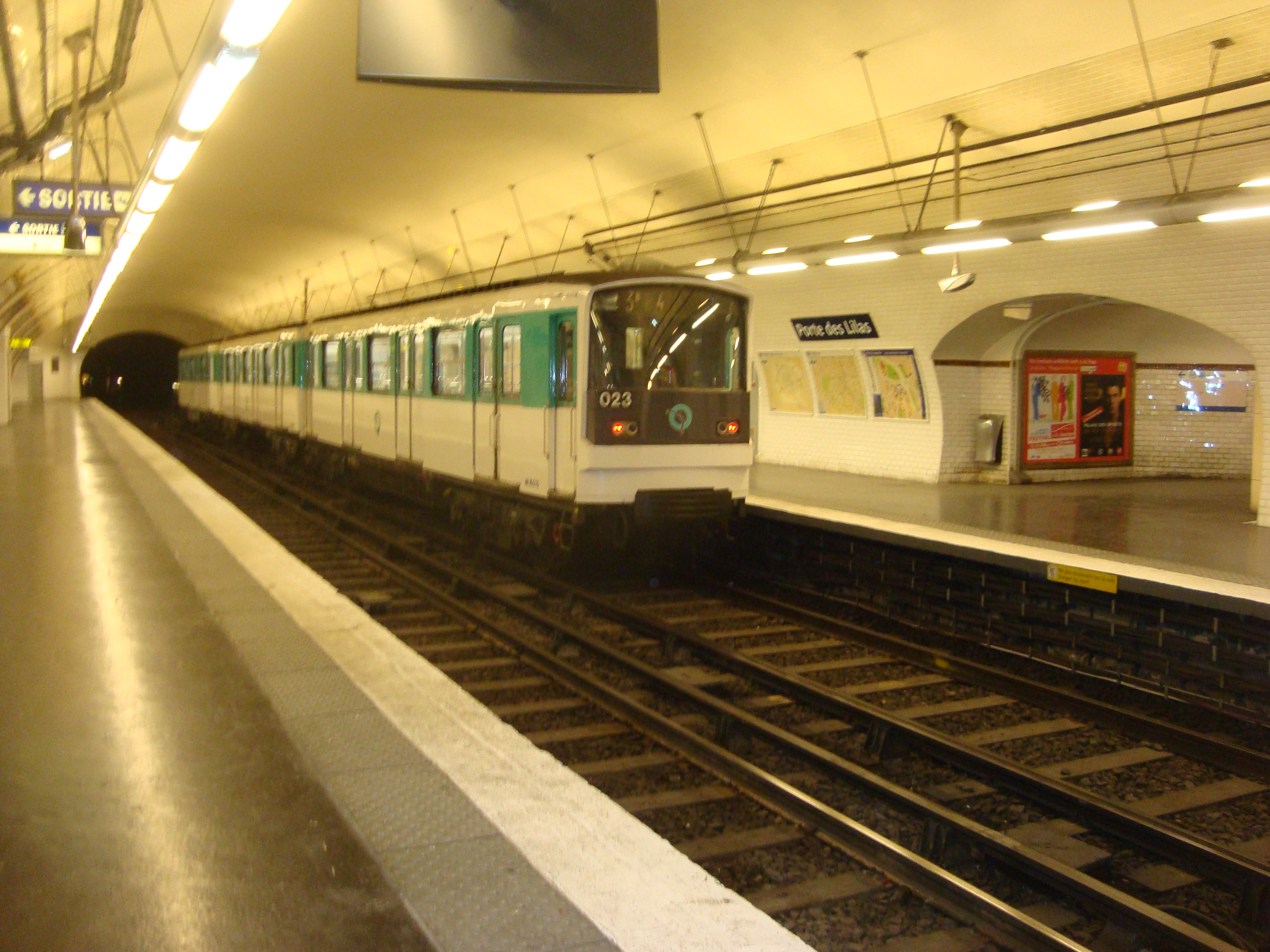 Quai de la station Porte des Lilas sur la ligne 3bis. Rame à l'arrêt avant départ direction Gambetta.